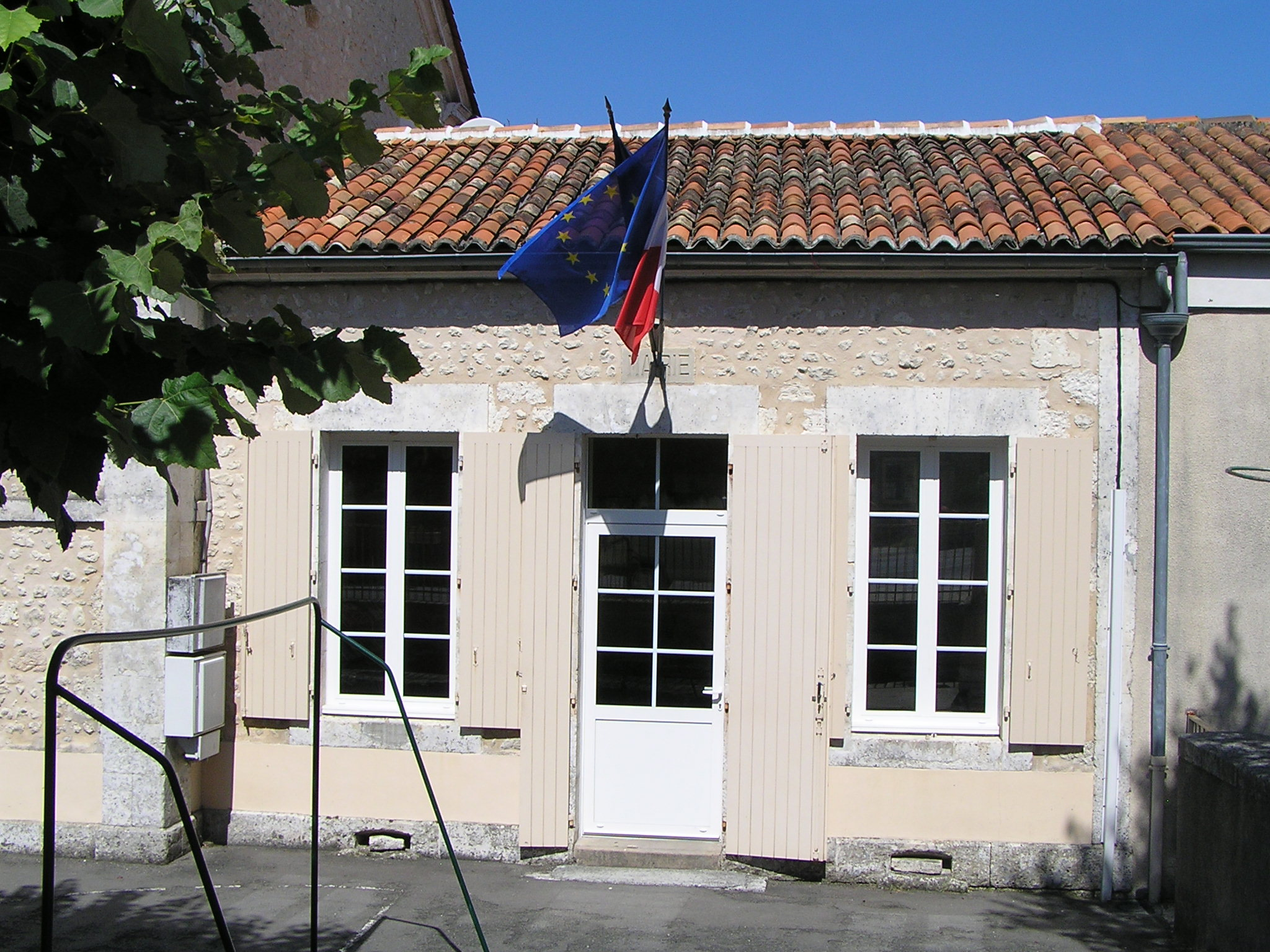 mairie de Champagne-Vigny